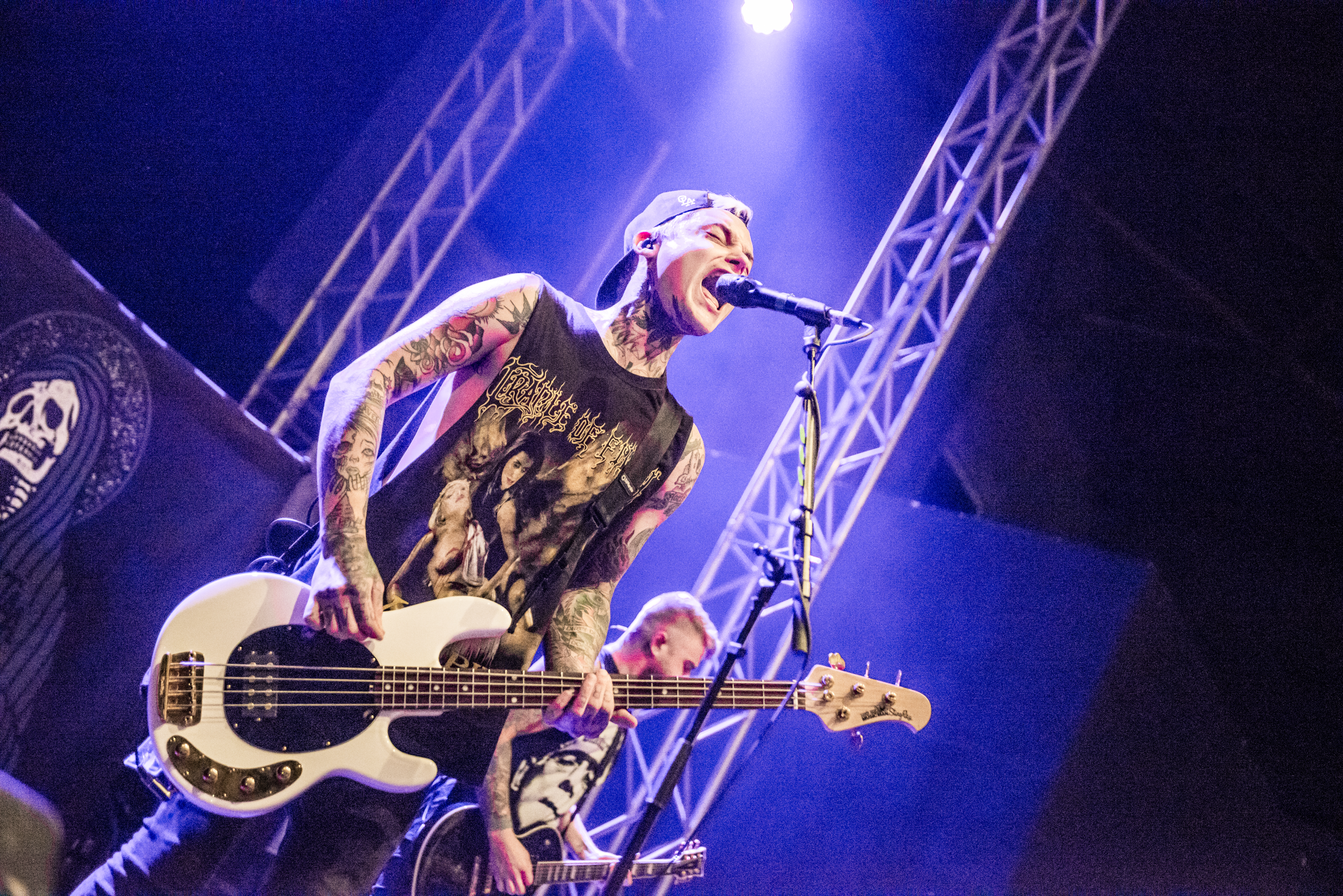 'The Amity Affliction - Impericon Never Say DIE! - Oberhausen'